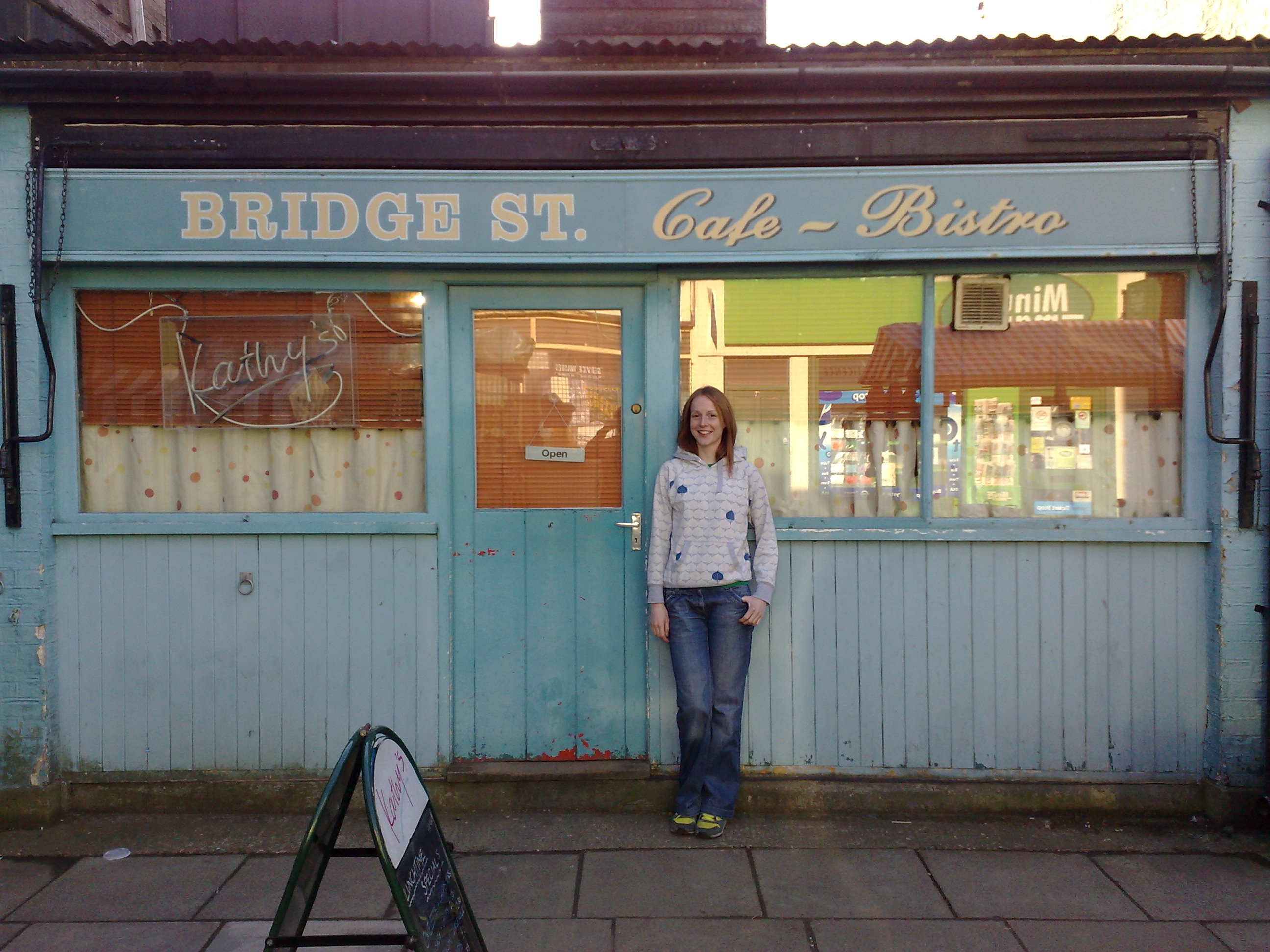 Enders Caf